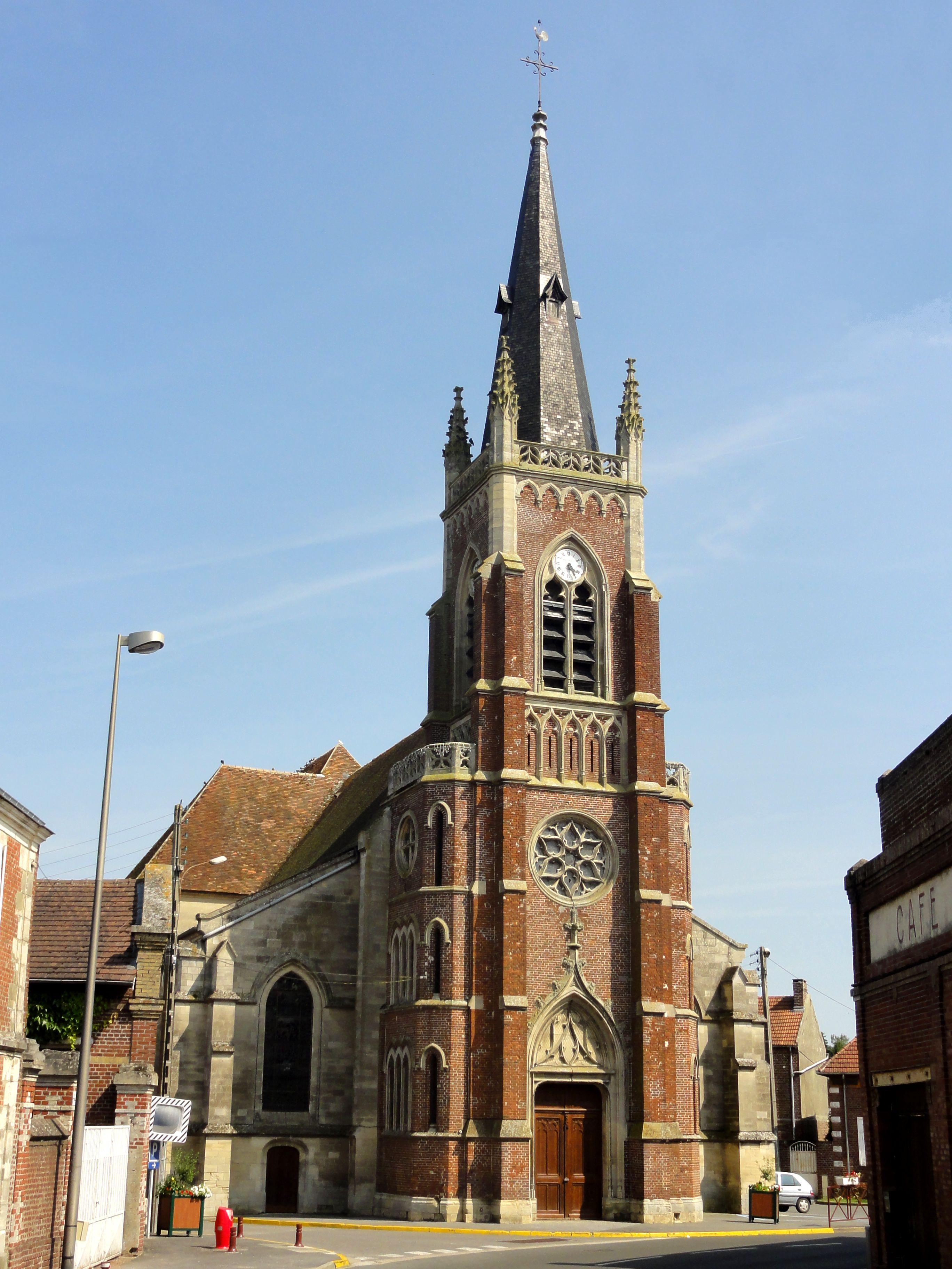 Façade occidentale (non classée).